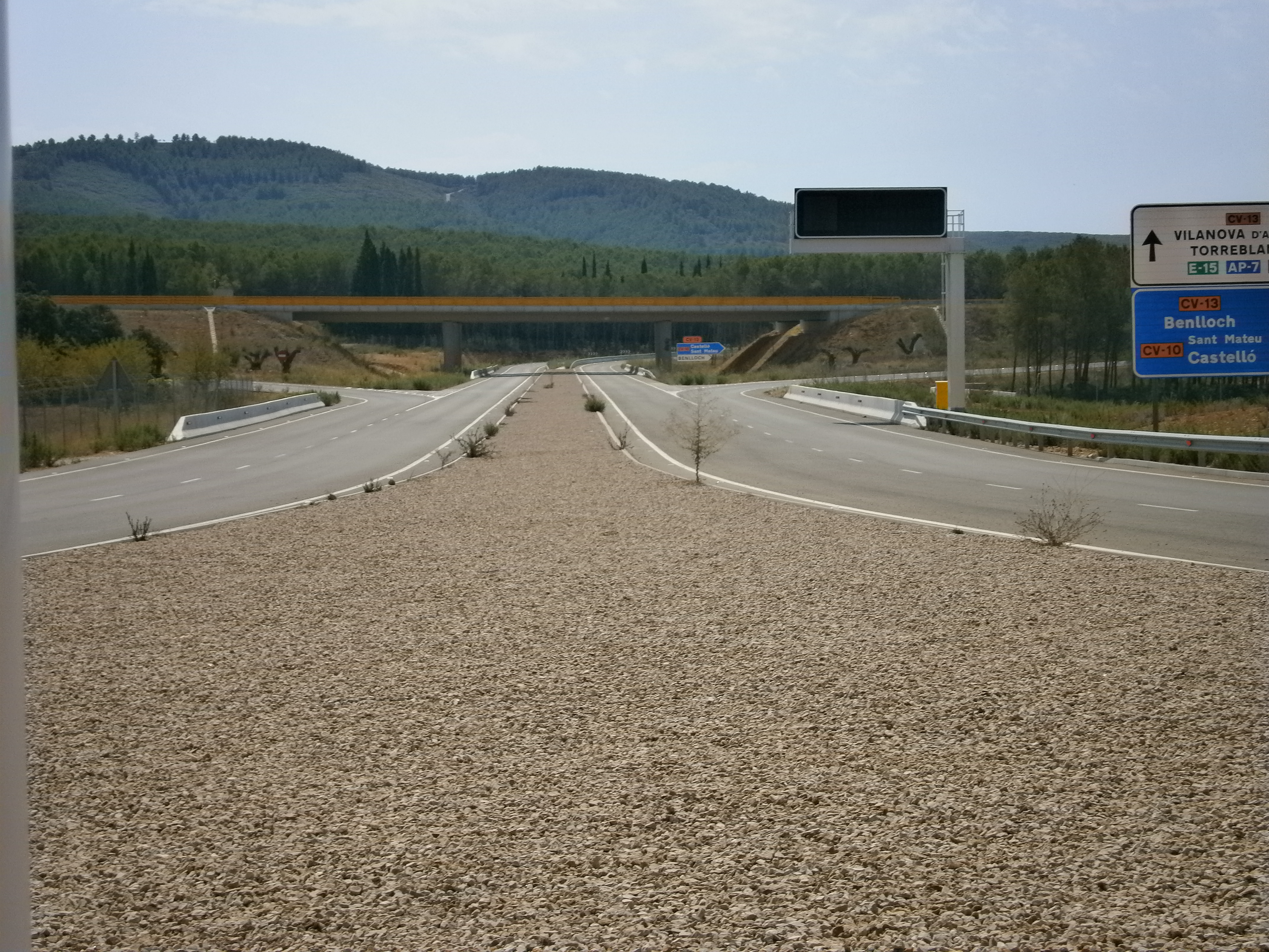 Accesos al aeropuerto de Castellón desde la CV13